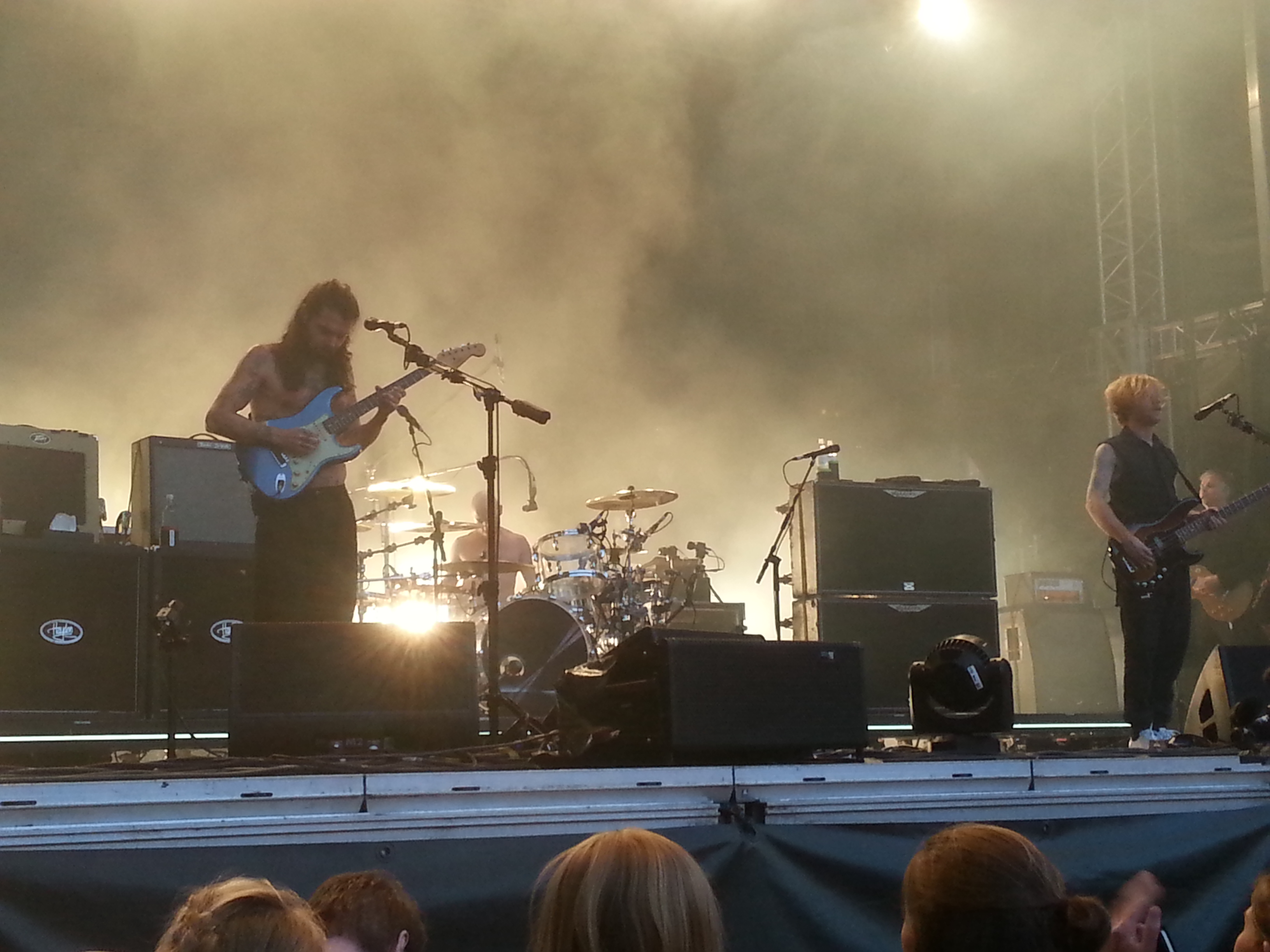 Biffy Clyro live på Bergenfest 2016 på Bergenhus festning.